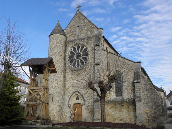 Façade occidentale de l'église Saint-Rémy de Ferrières-en-Brie (77).